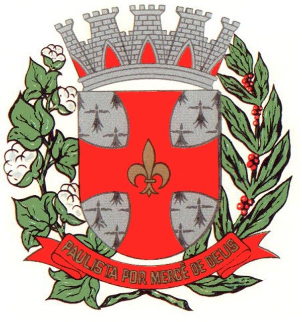 Brasão do município de: Regente Feijó, São Paulo, Brasil